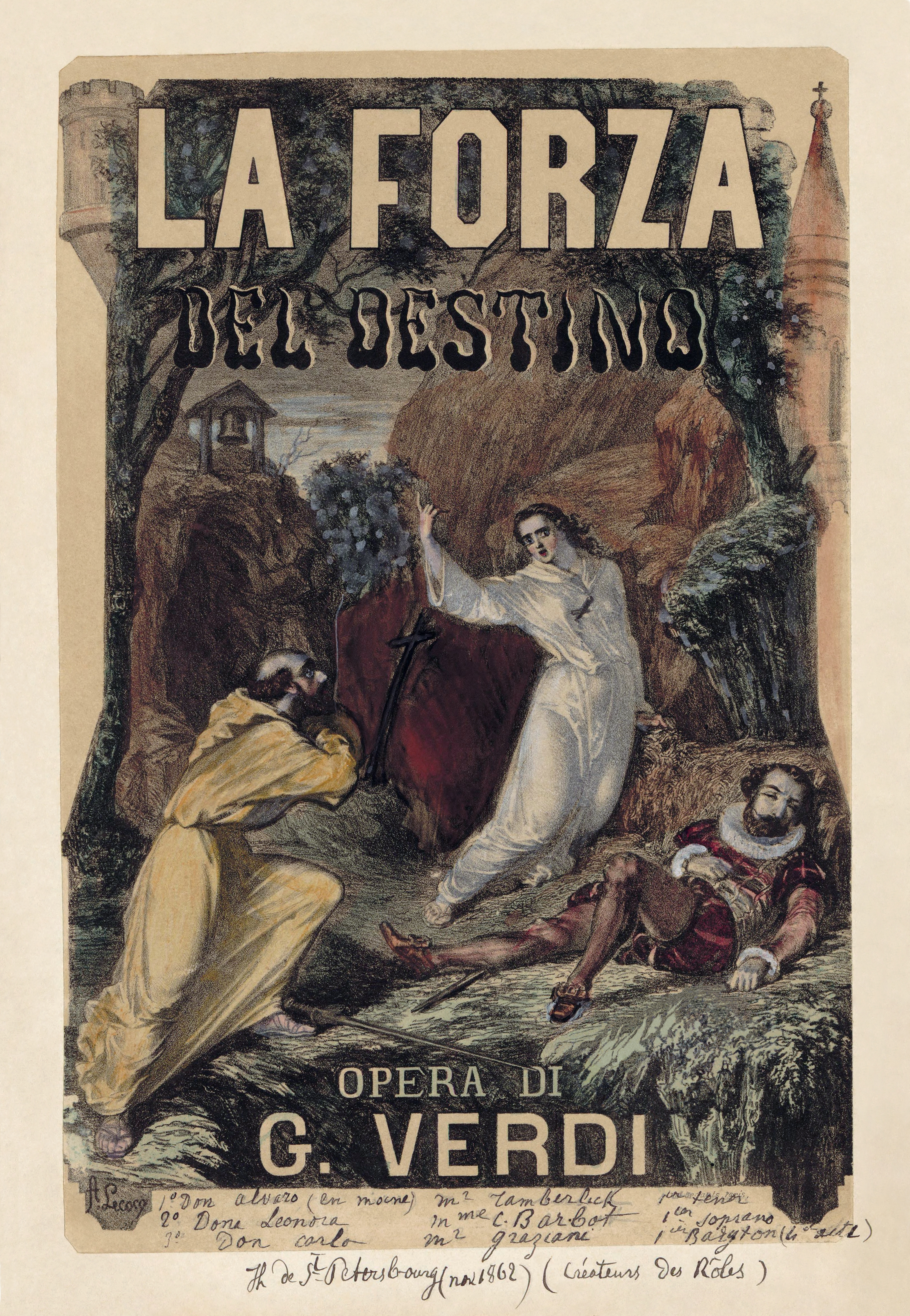 Poster (presumably) for Giuseppe Verdi's La forza del destino